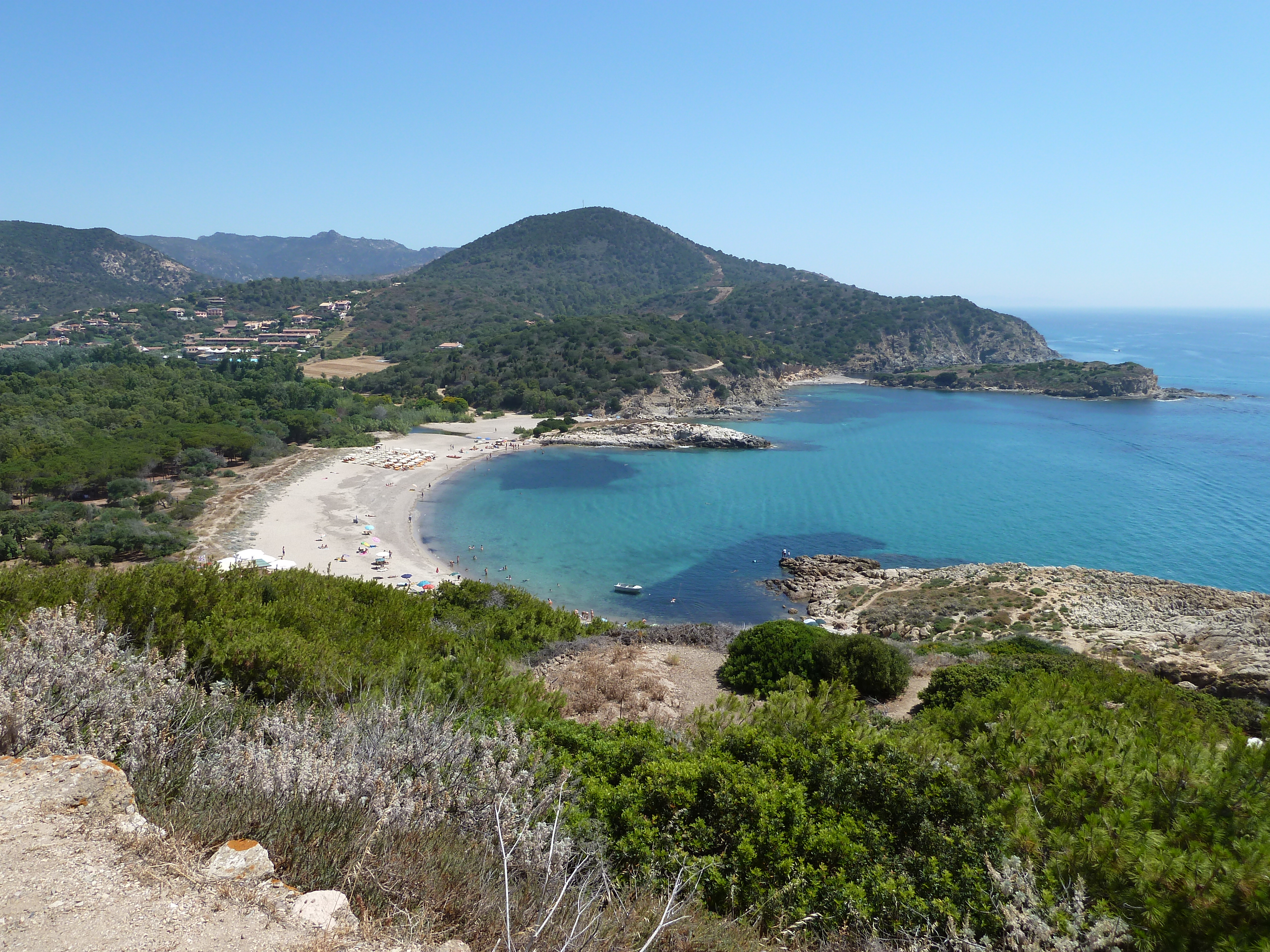 plages de chia